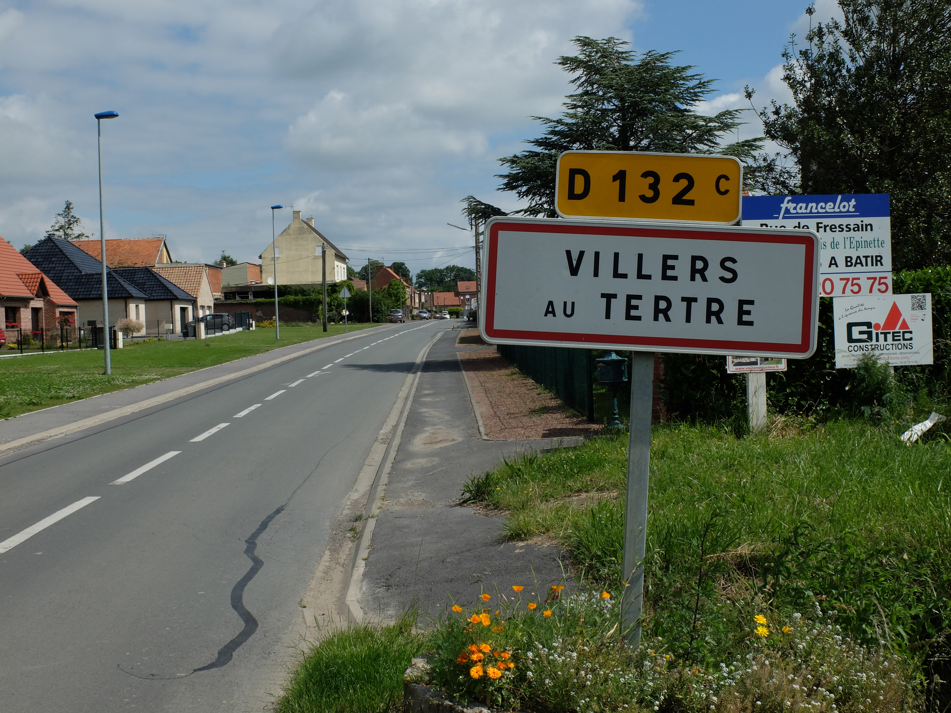 Vue d'une entrée de la commune de Villers-au-Tertre.